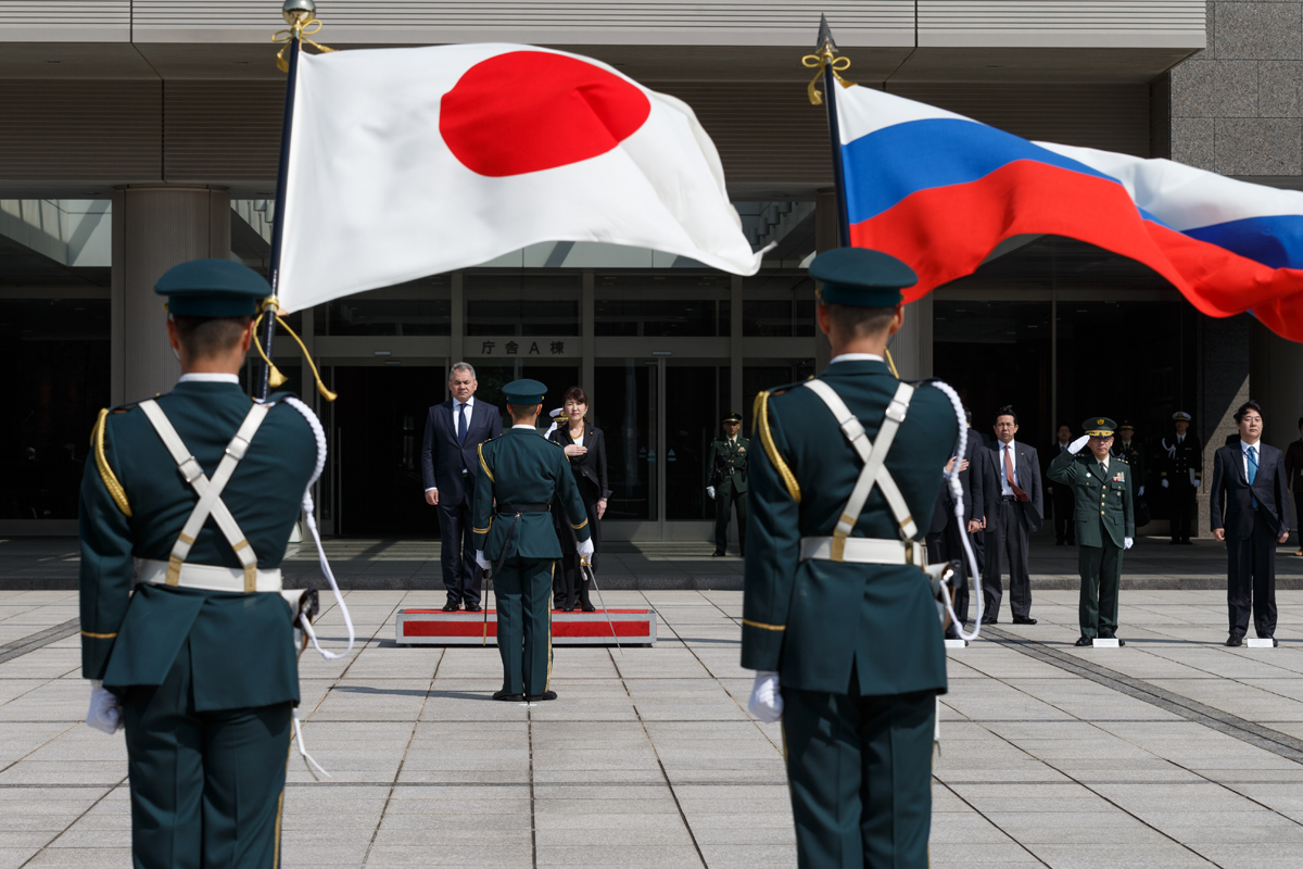 Визит Министра обороны России генерала армии Сергея Шойгу в Токио на переговоры с японским коллегой Томоми Инадой (г. Токио, Япония)